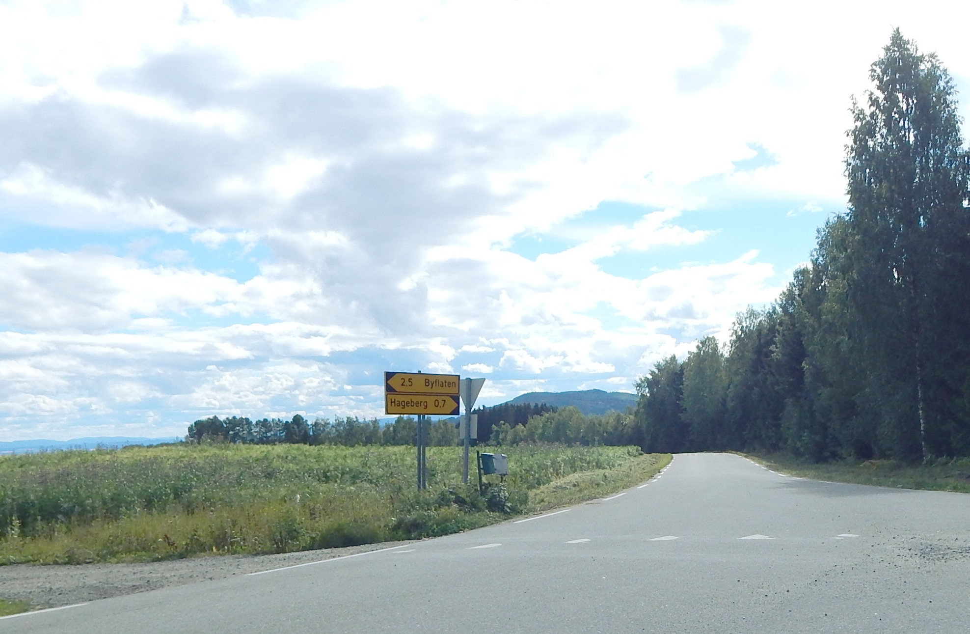 Fangbergsvegen (FV1784, tidl. 94, innover i bildet) i krysset med FV1782 (Flesakervegen t.v., Løkendalsvegen t.h.)